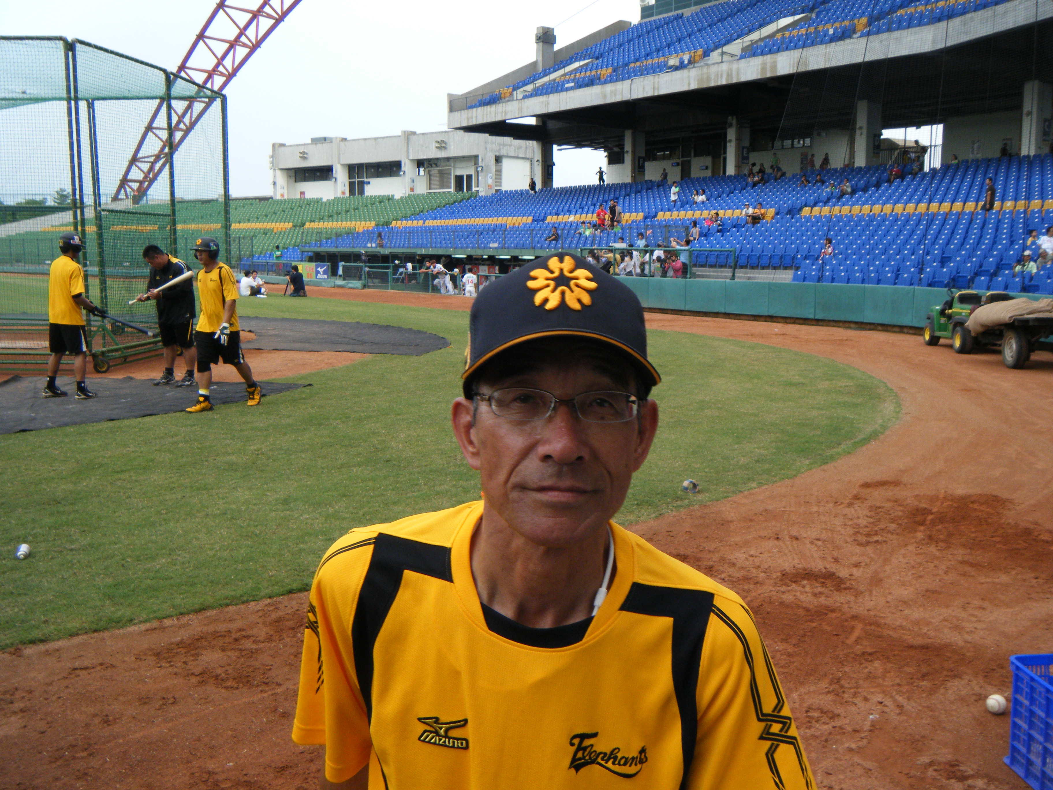 中文（台灣）: 中華職棒兄弟象隊首席教練榊原良行。